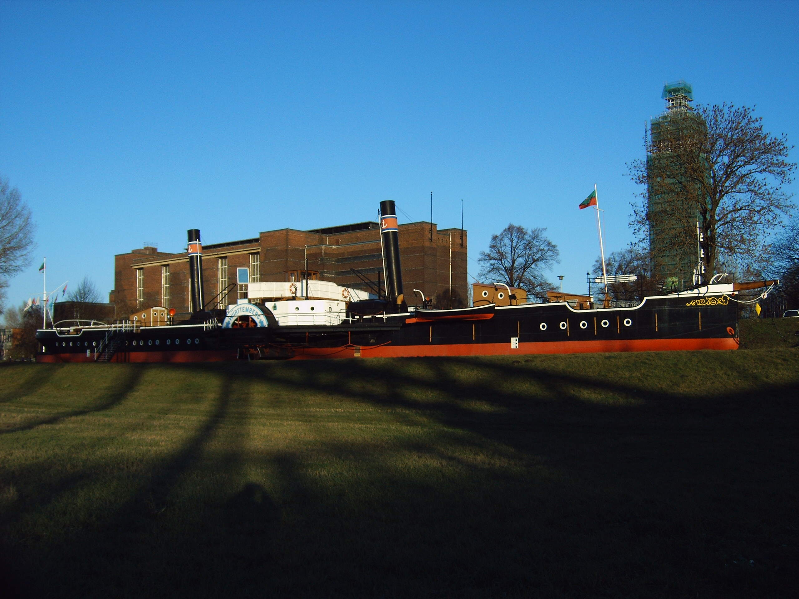 MS Württemberg, Schaufelraddampfer an der Elbe in Magdeburg, Bild aufgenommen am 26.11.2005 von Olaf2